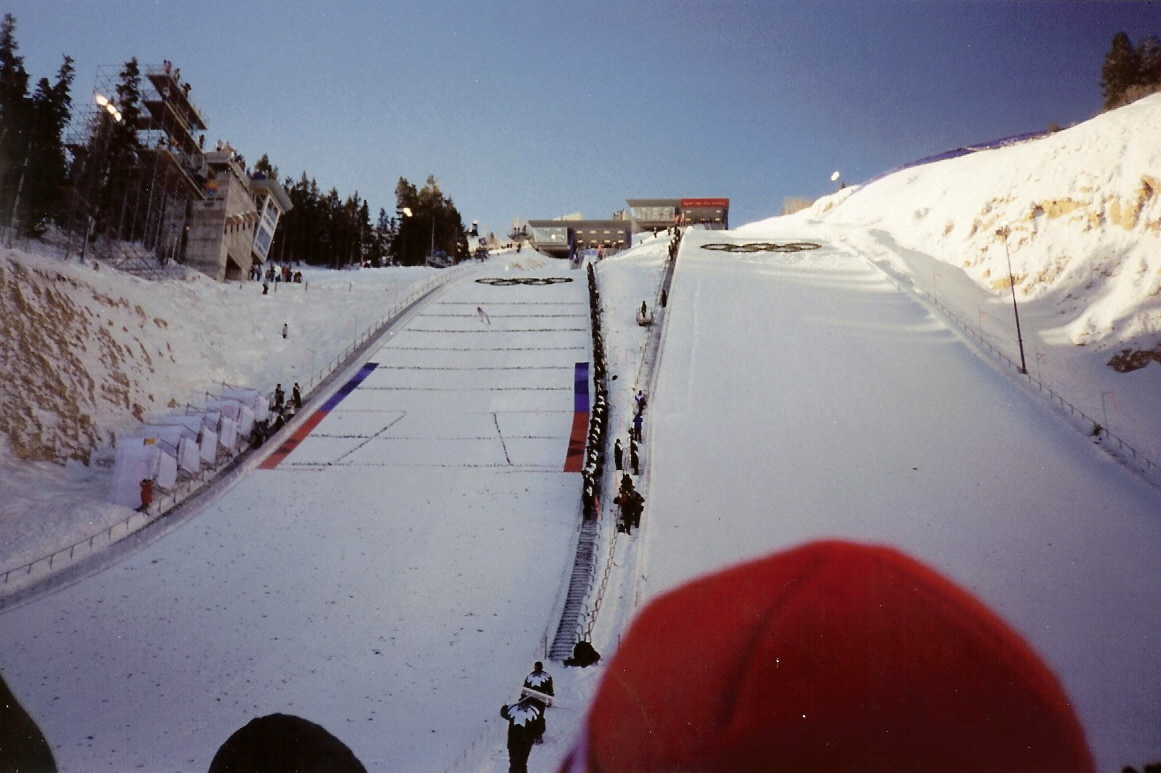 Un sauteur aux JO 2002 dans le combiné nordique